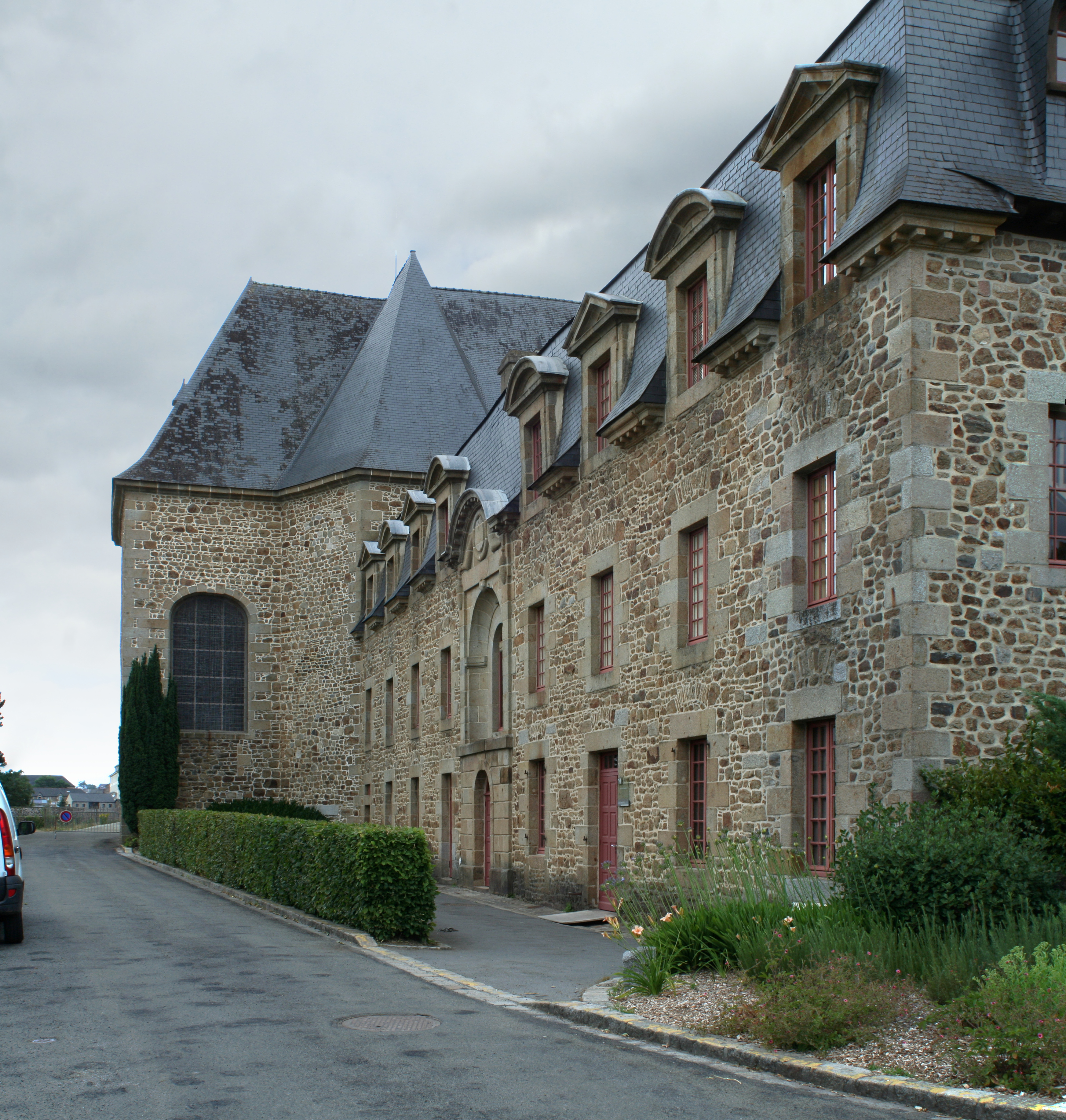 Couvent des Clarisses Urbanistes de Fougères, face sud.